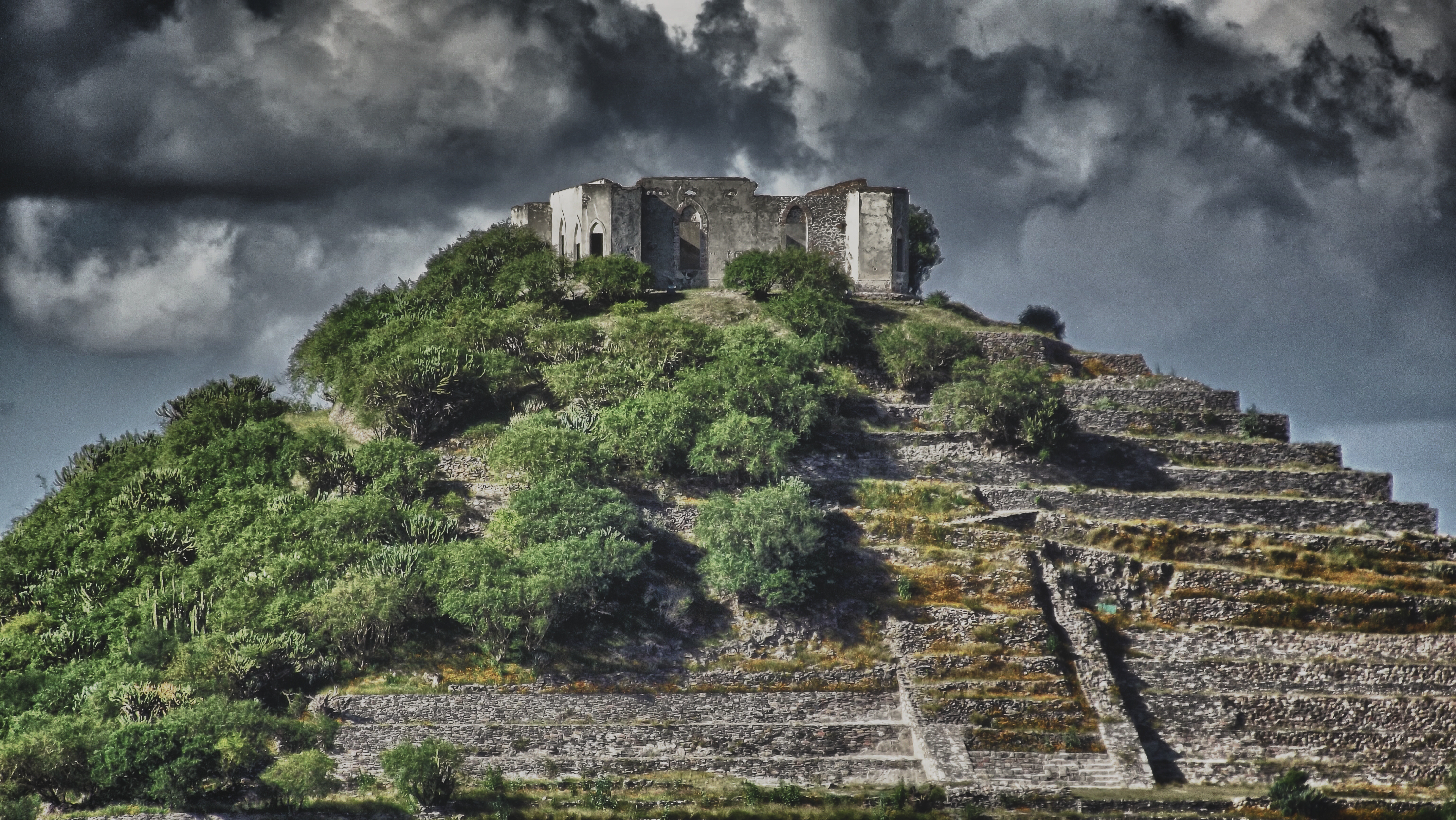 Es un yacimiento arqueológico que se encuentra en el municipio de Corregidora, a siete km del centro de la ciudad de Santiago de Querétaro